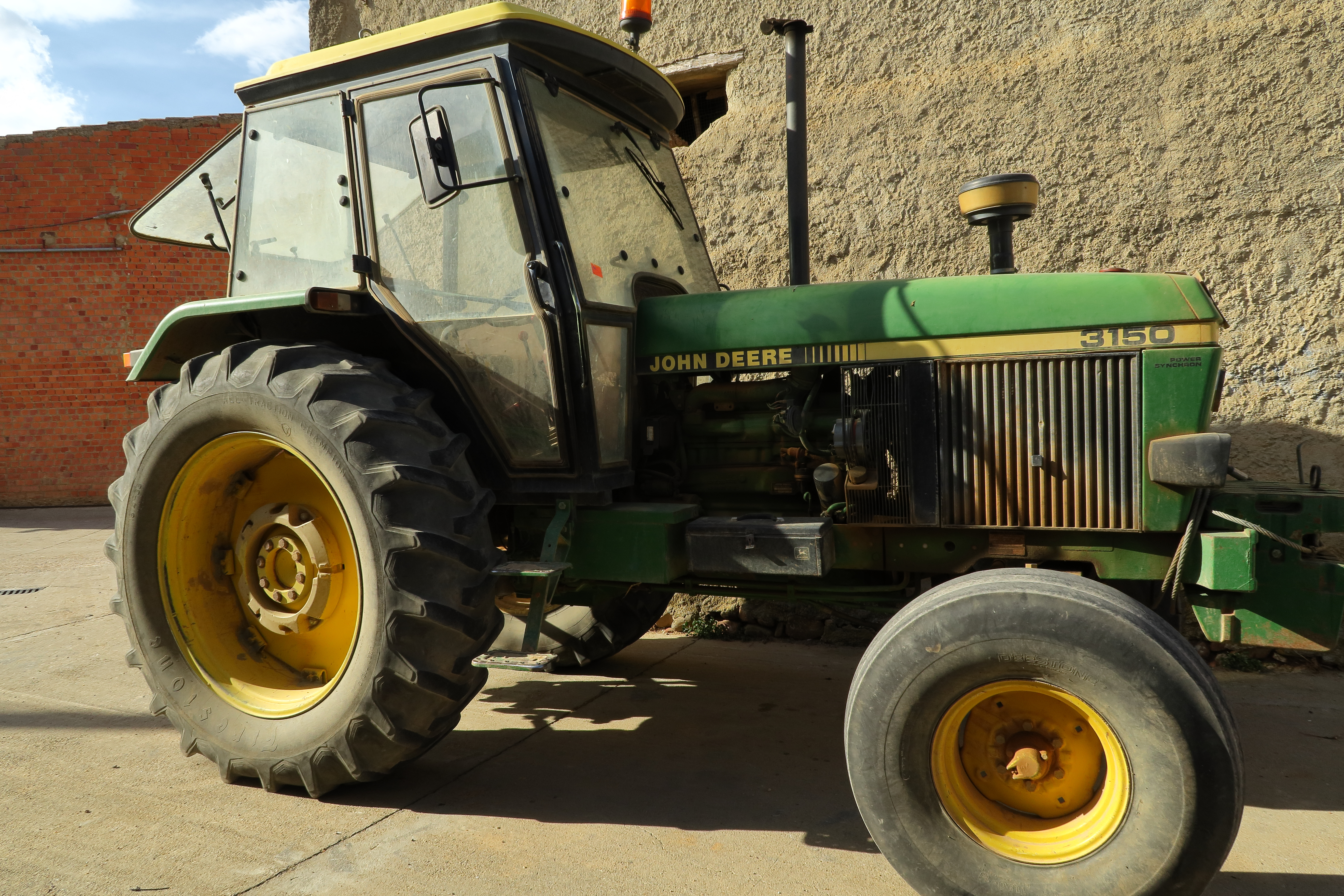 Pajares de la Lampreana, tractor John Deere 3150